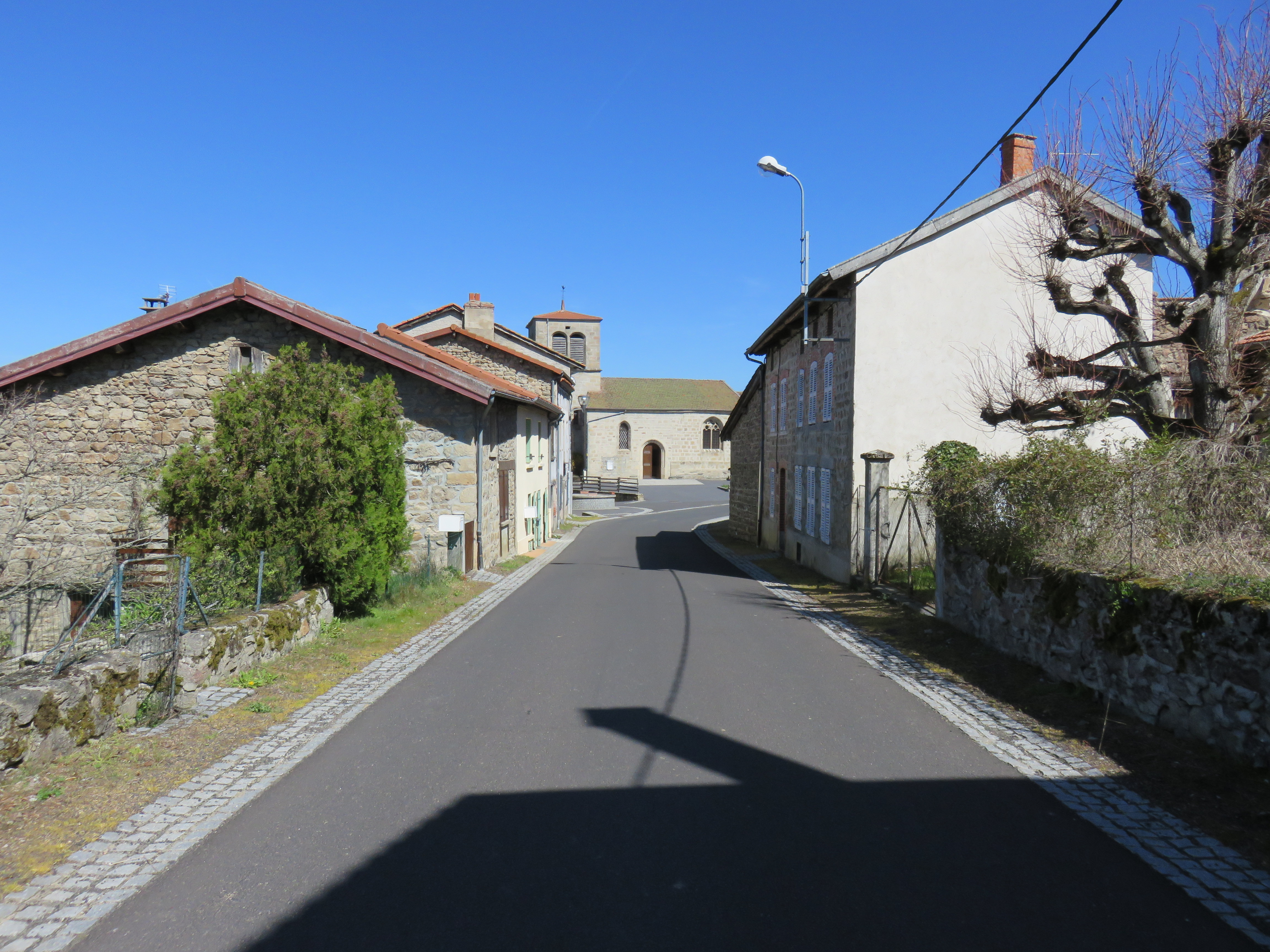 Route départementale 251 traversant le village de Saint-Just (Puy-de-Dôme, France).